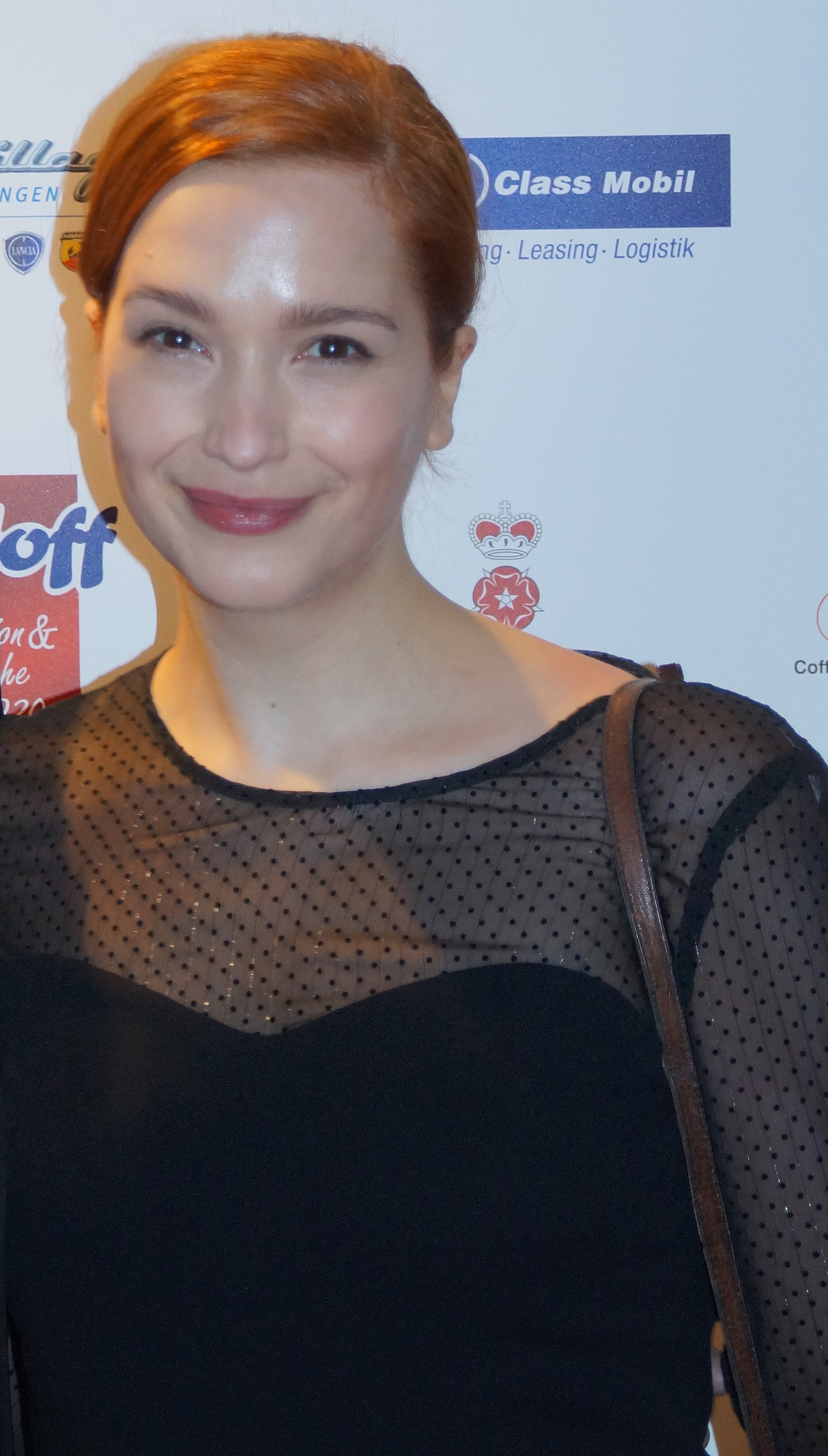 Raphael Vogt und Uta Kargel beim Askania Award 2016.